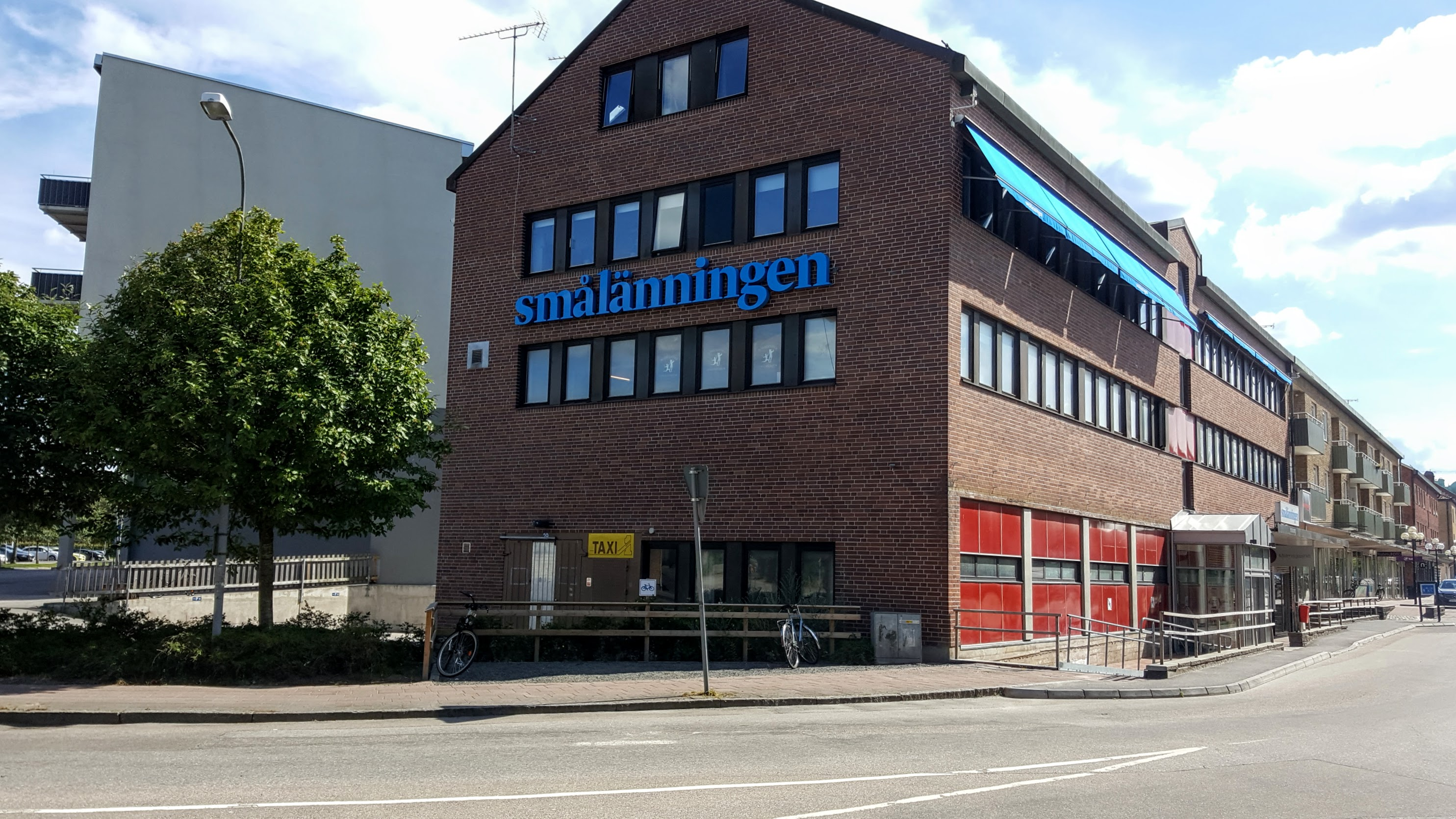 Dagstidningen Smålänningen:s huvudkontor sedd från hörnet av Drottninggatan/Föreningsgatan.